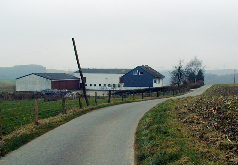 Neukretze, Hückeswagen